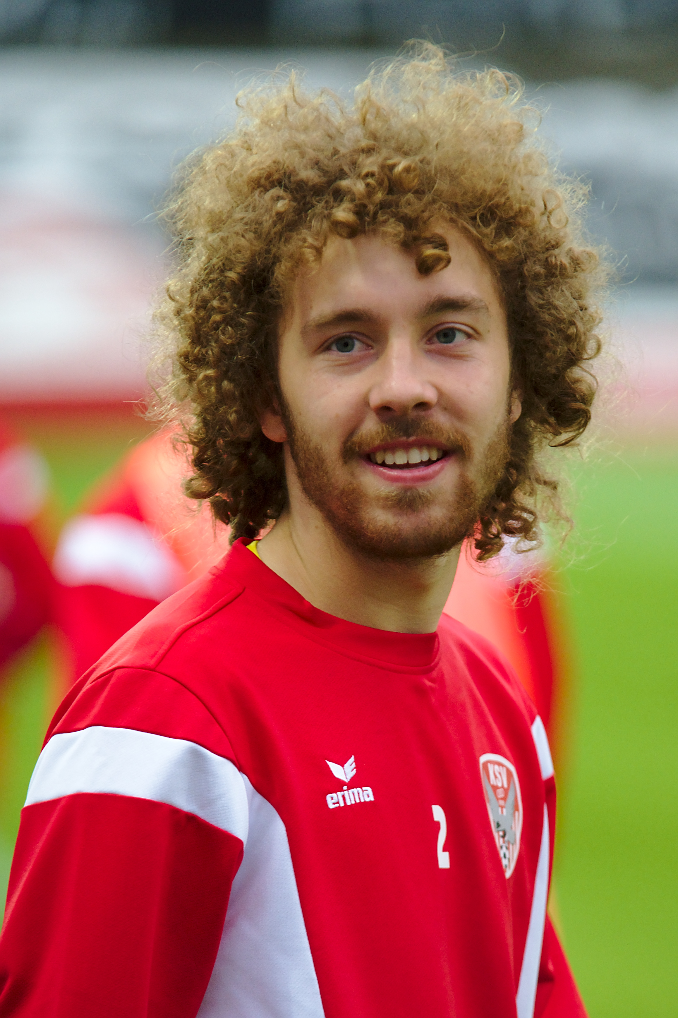 Saisonvorbereitungsspiel Admira Wacker Mödling gegen Kapfenberger SV am 17.6.2017, Bild zeigt: Jan-Kristian Thurner